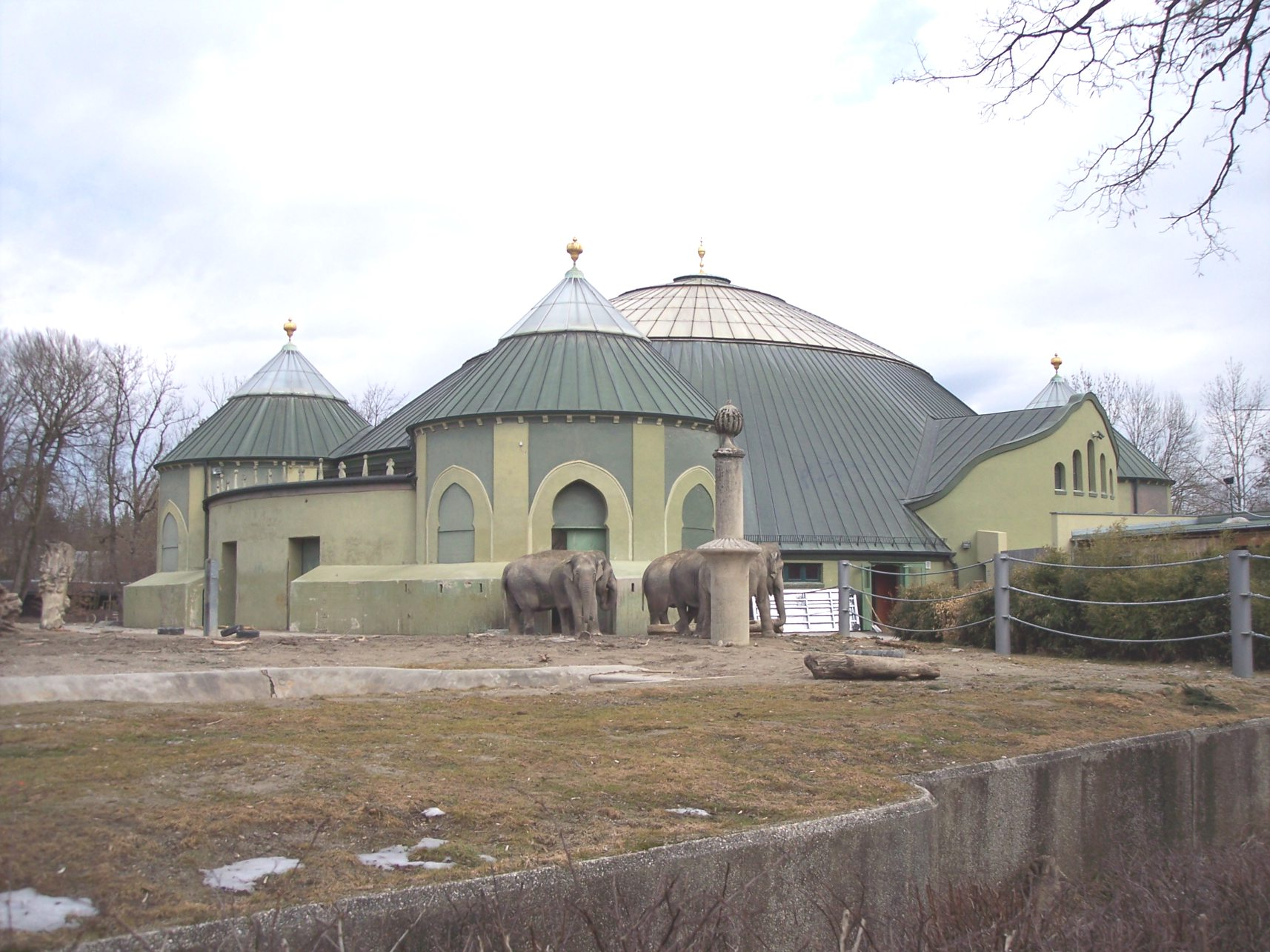 picture was taken on March 27,2006 by me. It shows the elephant house in the Hellabrunn Zoo in Munich Germany Dieses Foto wurde am 27.03.2006 von mir gemacht. Es zeigt das Elefantenhaus des Münchener Tierparks Hellabrunn.